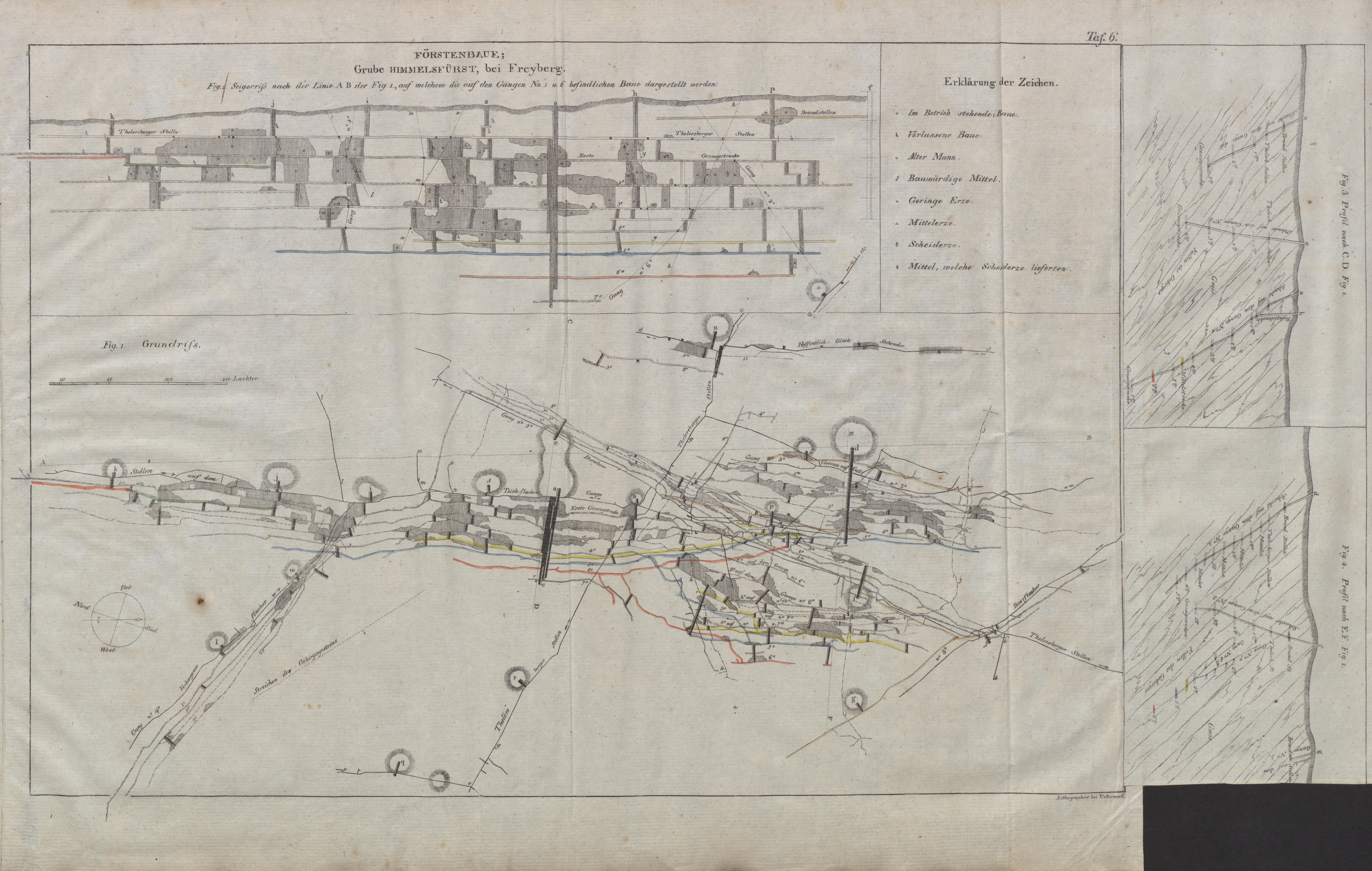 Abbildung aus: Atlas zu des Herrn von Villefosse Mineral-Reichthum